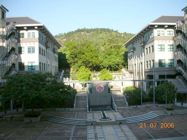 Wing On Plaza, Lingnan University, Hong Kong 永安廣場, 嶺南大學 (香港)